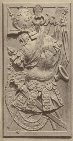 Siehe Source.